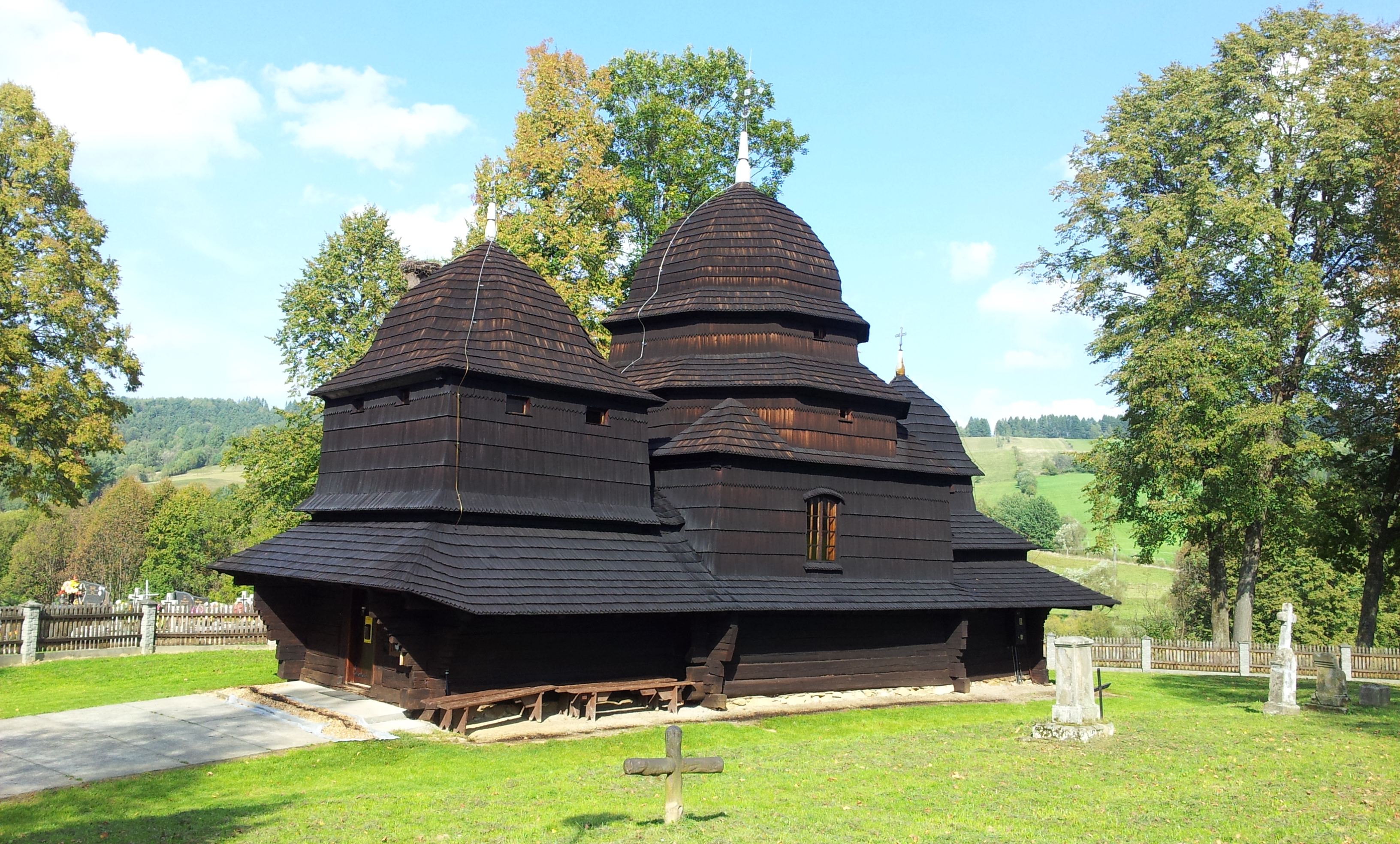 Cerkiew w Równi